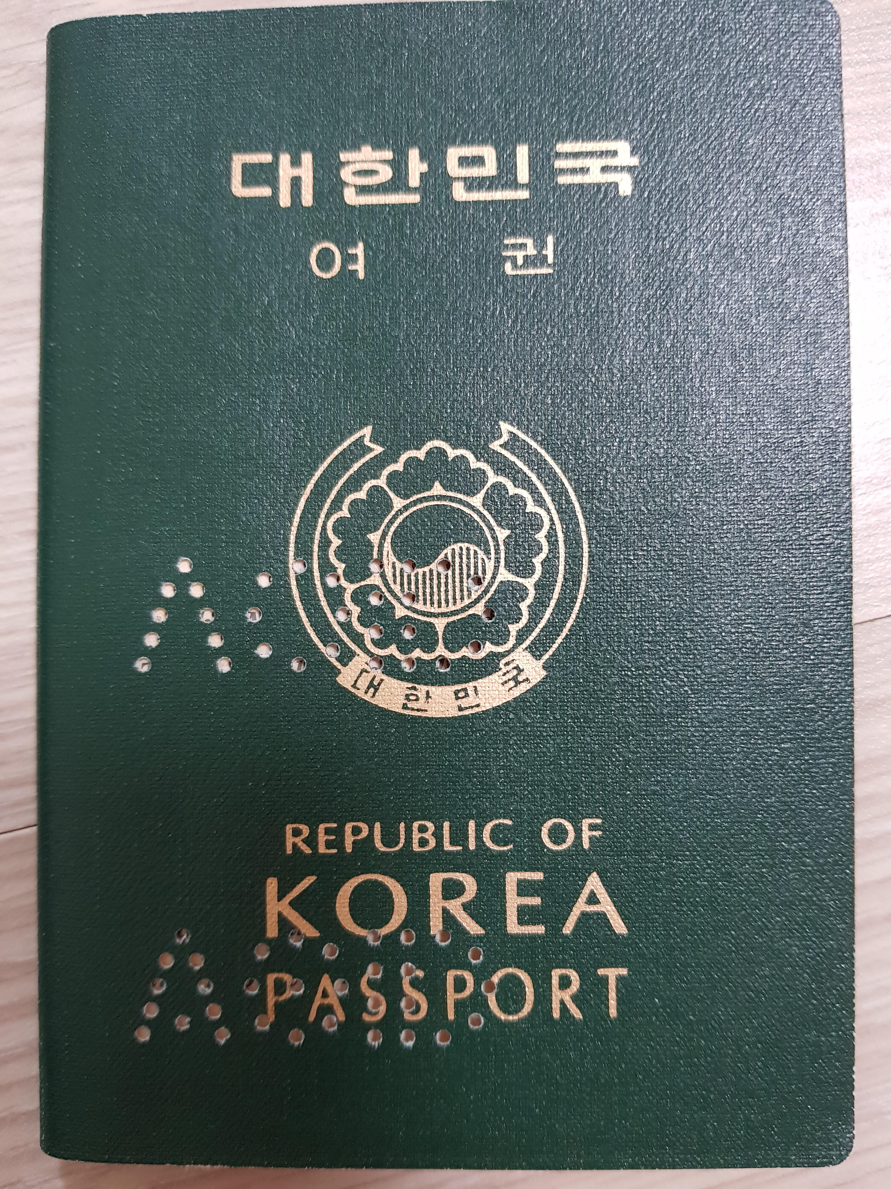 2020년 1월 1일 이전에 발행된 대한민국 여권의 표지.